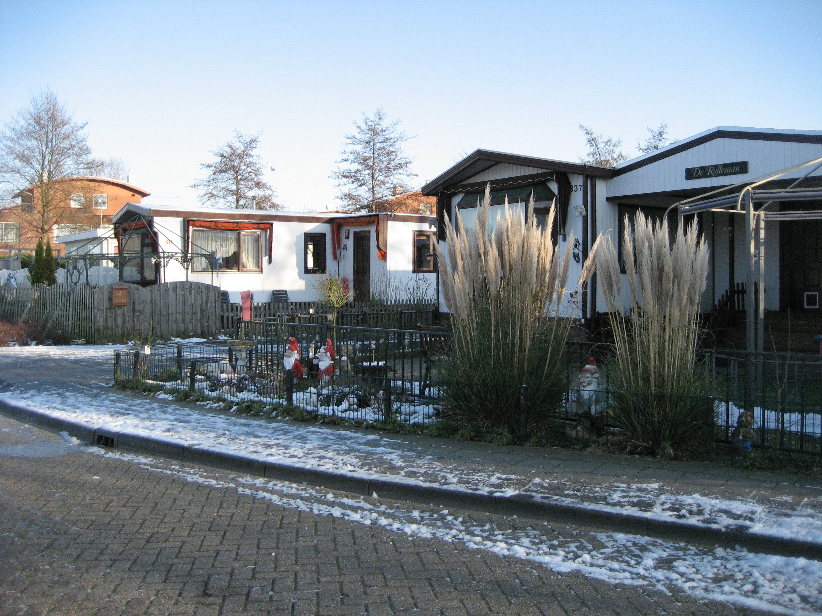 "De Rolleman" en enkele andere woonwagens. Woonwagenkamp op de grens van Den Haag en Leidschendam